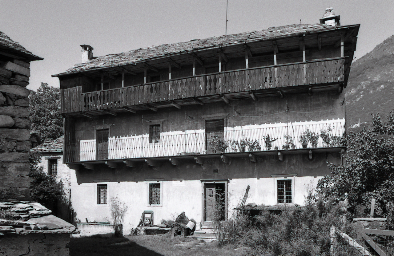 Servizio fotografico : Pieve Vergonte, 1982 / Paolo Monti. - Strisce: 5, Fotogrammi complessivi: 17 : Negativo b/n, gelatina bromuro d'argento/ pellicola ; 35 mm. - ((Sul portanegativi: N[I]K[MA]T FP4 e iscrizione: "Pieve Vergonte 8-23 e 37". - La serie è costituita dai fotogrammi nn.: 08-23; 37. - Confronta scheda 3851Lpbn08-37. - Occasione: Documentazione per la pubblicazione. - Fonte: Agenda di Paolo Monti: Nikon Leika 3001-/ Monti 1978 (1978-1982), presso Archivio Paolo Monti